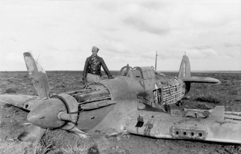 Der erfolgreichste Kampfflieger an der afrikanischen Front, Ritterkreuzträger Leutnant Marseille, der in der Zwischenzeit seinen 50. Abschuss tätigen konnte, mit der Feindmaschine, die er bei seinem 48. Luftsieg herunterholte. 31-3-42 [Herausgabedatum]-de-gu-schm PK-Aufnahme: Kriegsberichter Oppitz Information added by Wikimedia users.Dubbed the "Star of Africa", highly decorated, credited with over 100 victories in the desert, Marseille poses over one of his victims, a wooden-propped RAF Hurricane.